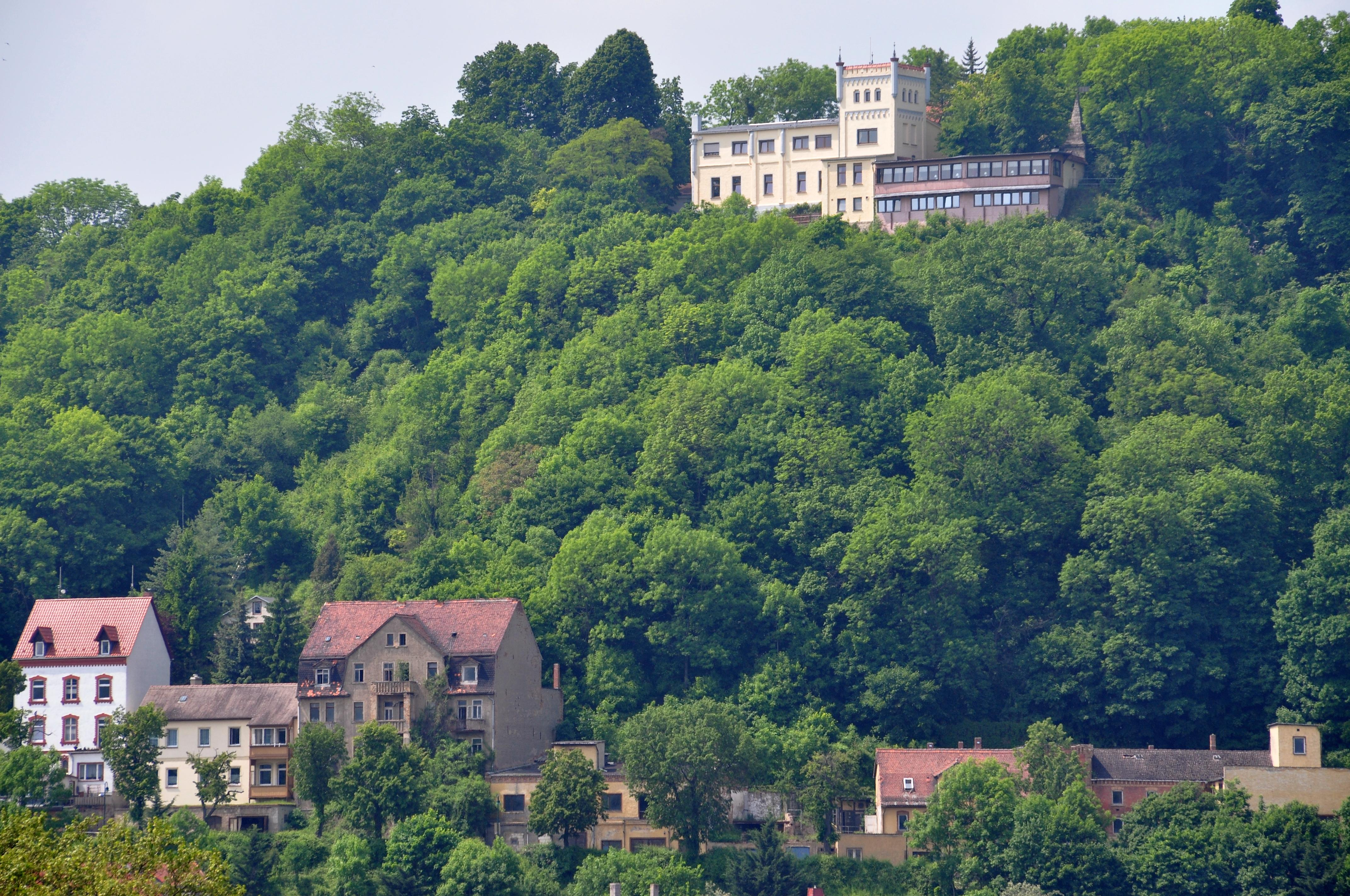 Berghotel Wilhelmsburg (oben am Waldrand) in Bad Kösen, vom Gradierwerk aus gesehen